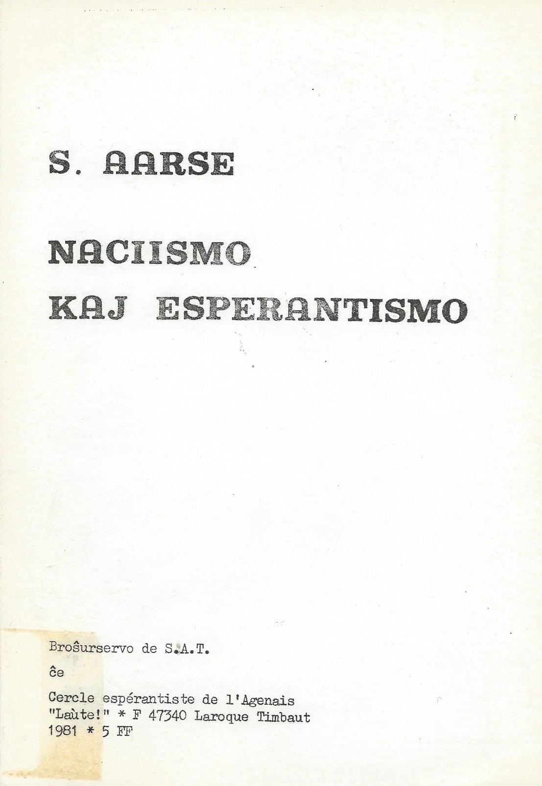 kovrilo de libro "Naciismo kaj Esperantismo", 1981